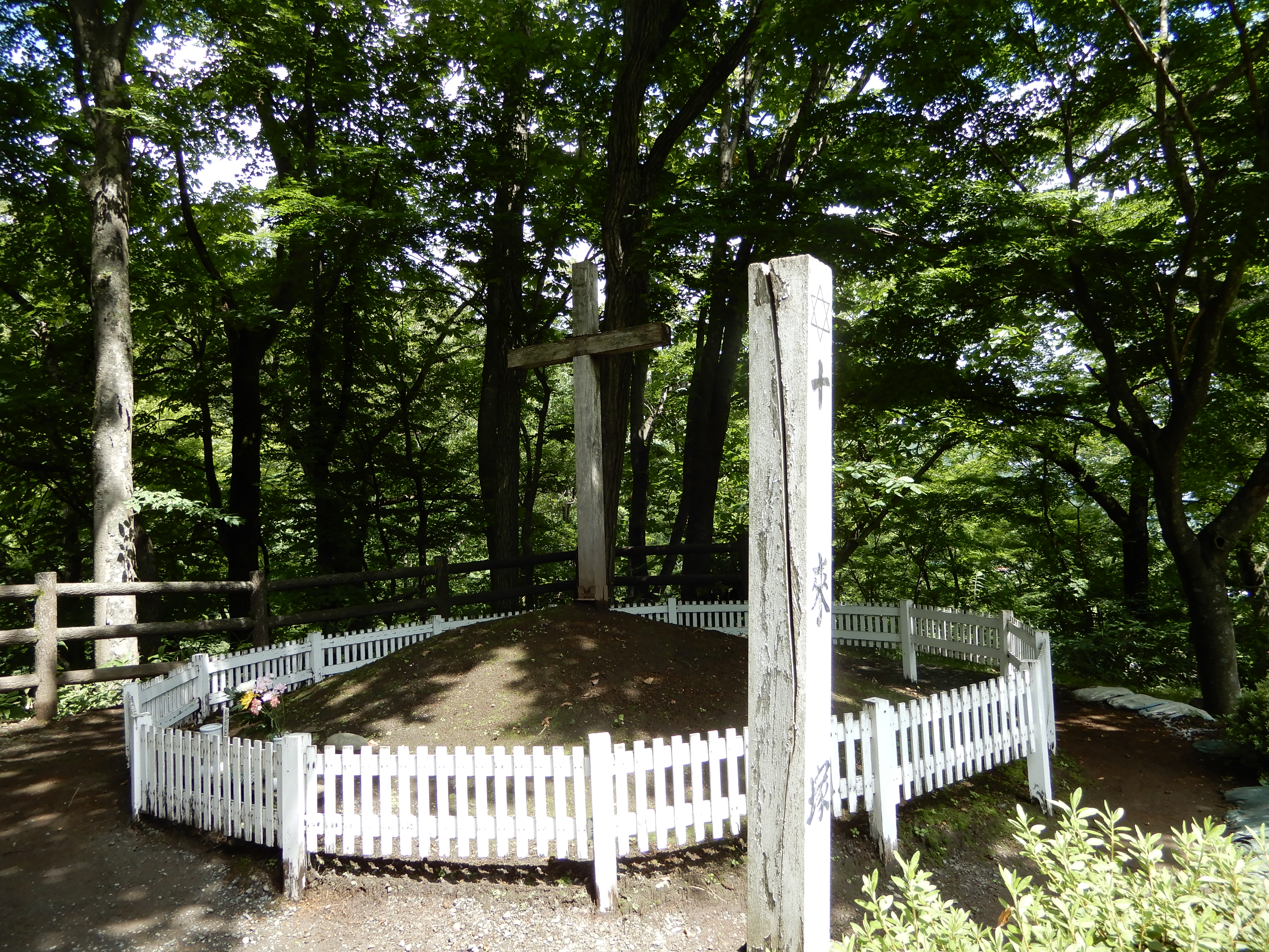 キリストの里公園(青森県三戸郡新郷村大字戸来字野月33-1)にあるキリストの墓